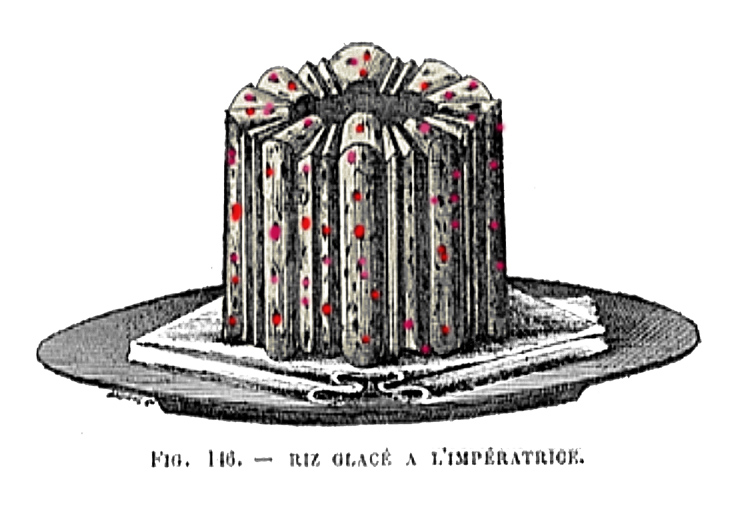 extrait du livre de Gustave Garlin La pâtissier moderne 1889